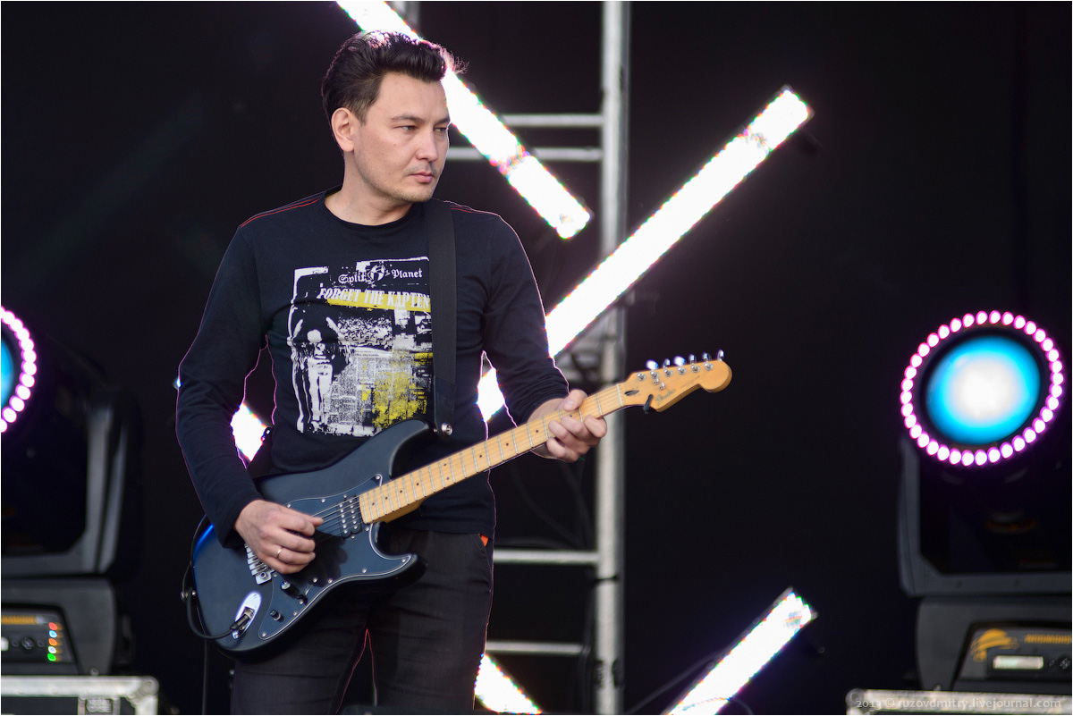 Евгений Гантимуров, группа "Смысловые Галлюцинации", фестиваль "Рок над Волгой" 2013